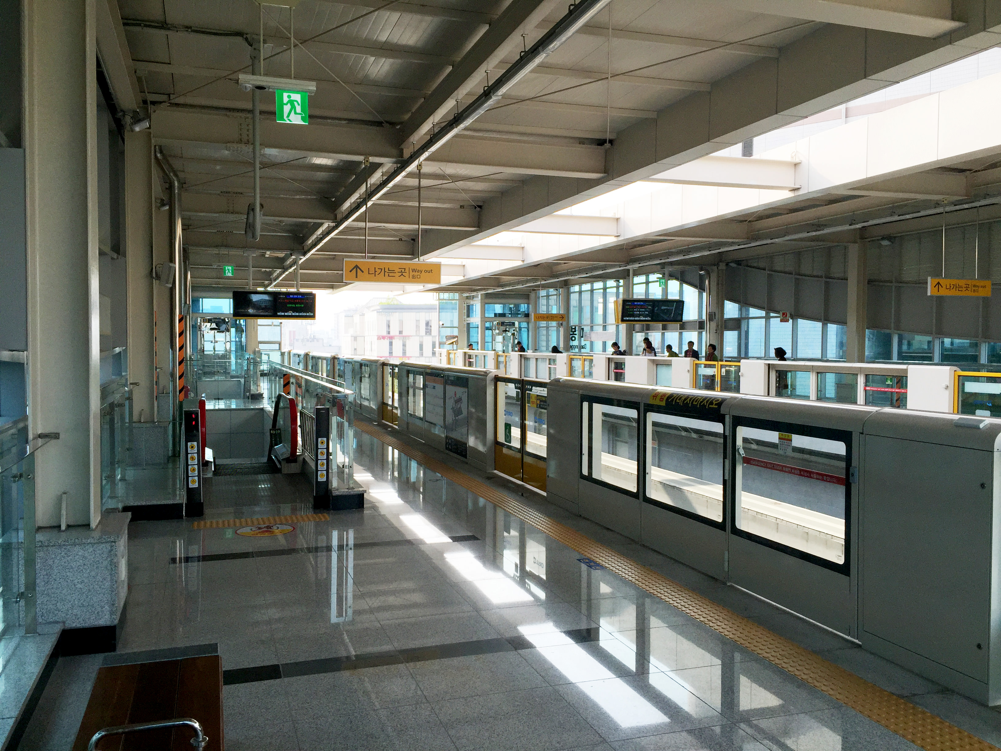 대봉교역 승강장